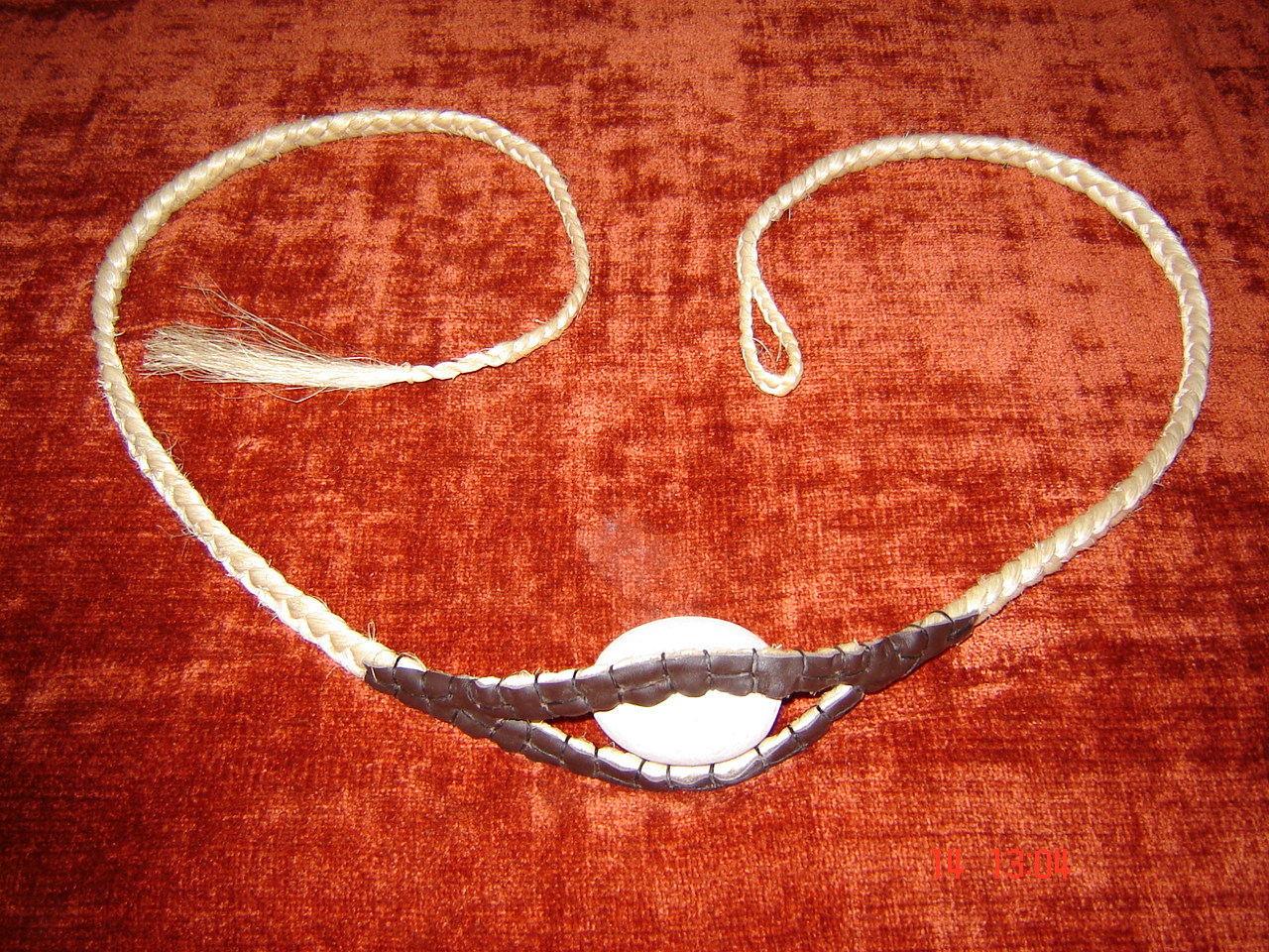 Rekonstruktion einer Steinschleuder der Balearen (Els Foners Balears) Basismaterial Faser, Agaven